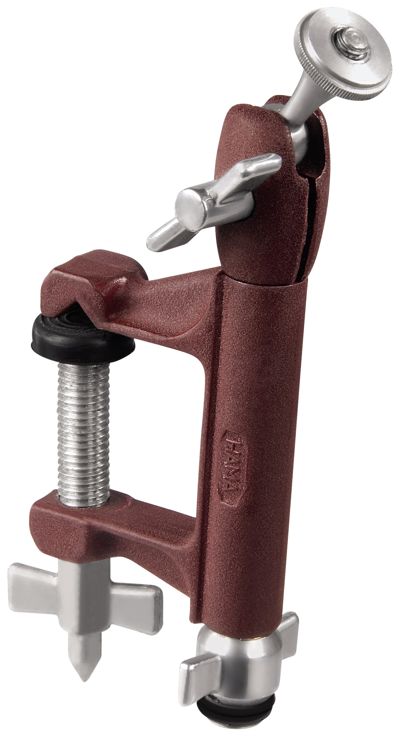 Hama Klemmstativ